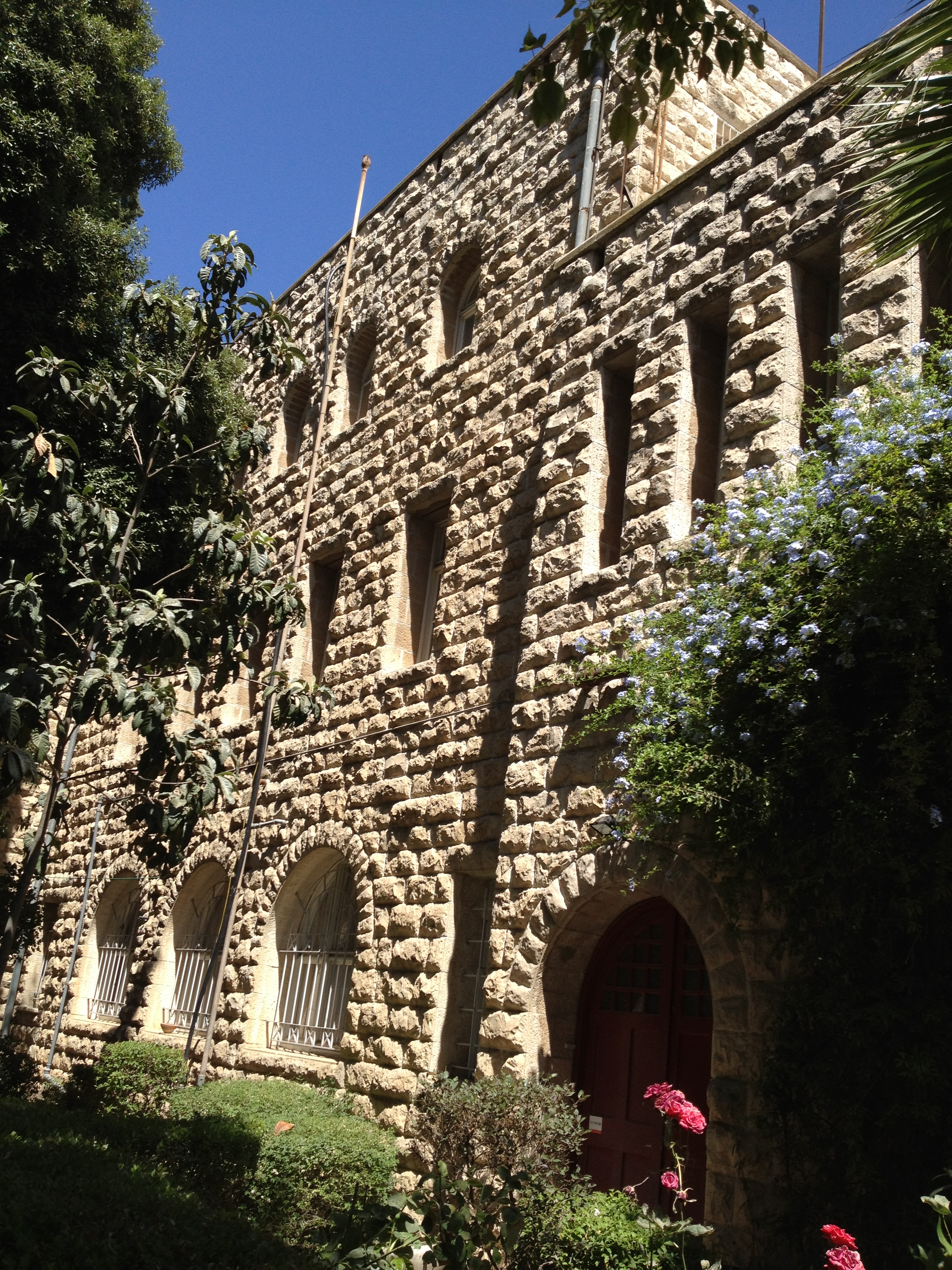 front view חזית הבניין